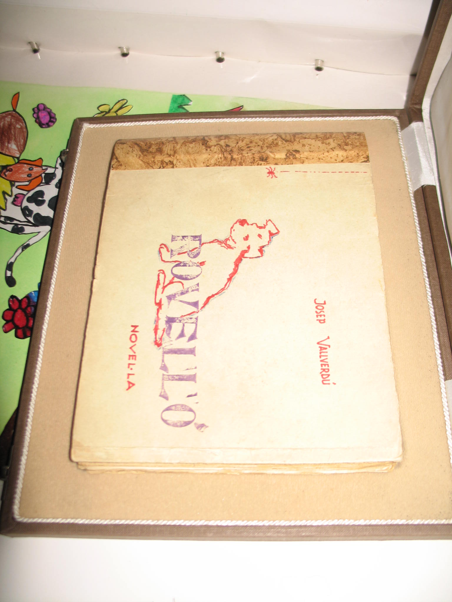 Original de l'obra Rovelló de Josep Vallverdú